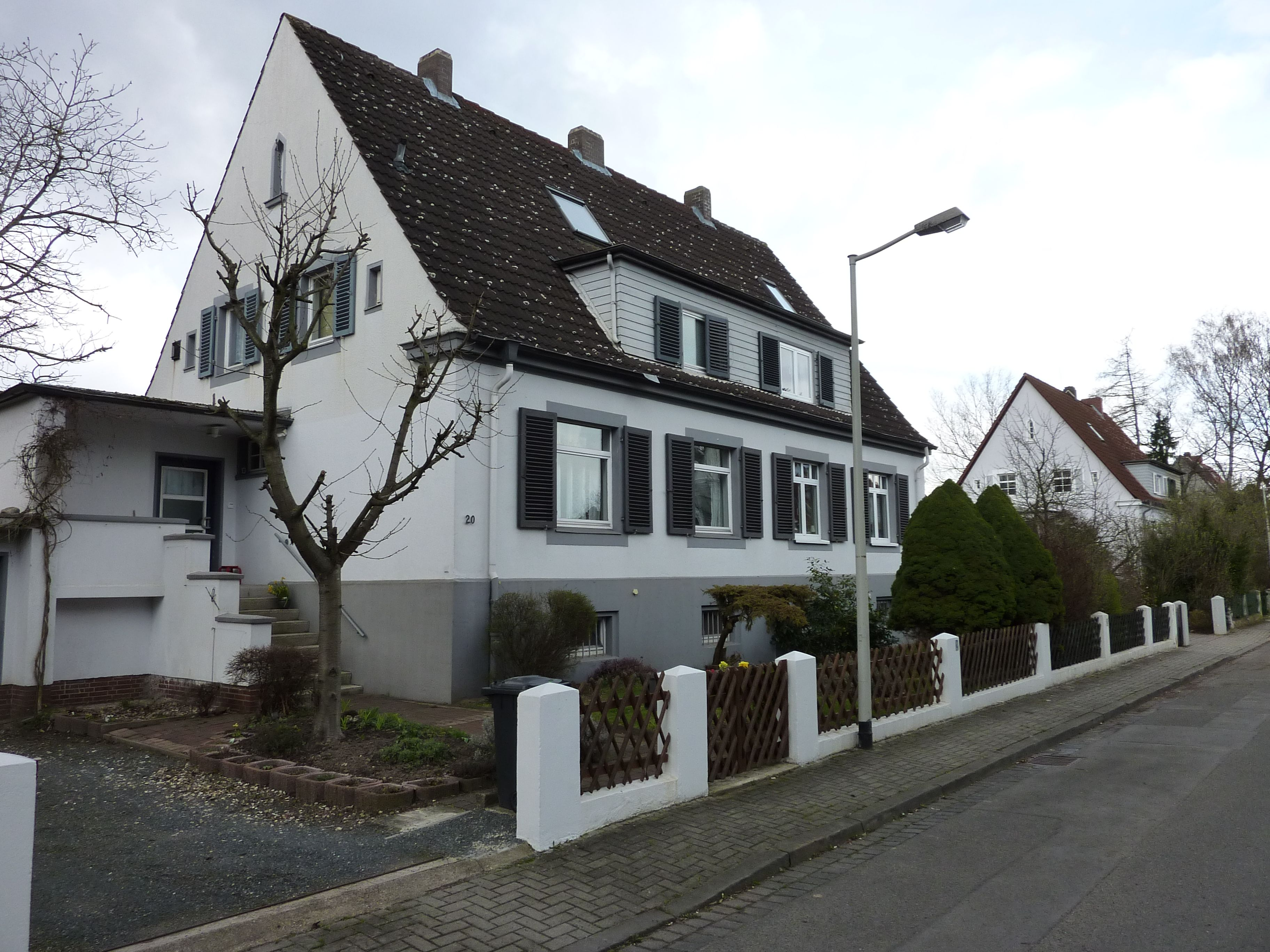 Gartendtadt Kirchrode Doppelhaus der 2ten Genration. Baujahr ca. 1929